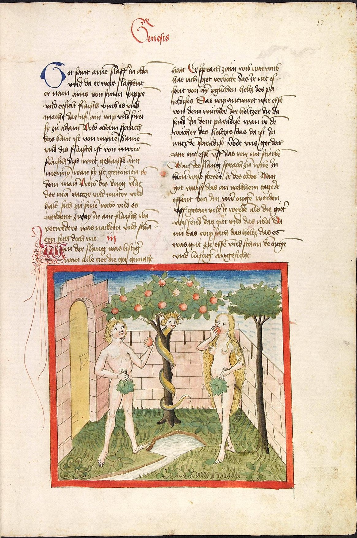 Codex Palatinus germanicus 16, Blatt 12r - Bibel, Altes Testament, Genesis: Sündenfall, Adam und Eva im Paradies essen die Frucht vom verbotenen "Baum der Erkenntnis". (Cpg 16 = Bibel AT, deutsch, Bücher Mose, Josua, Richter, Ruth)